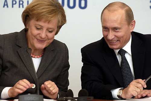 ТОМСК. С Федеральным канцлером ФРГ Ангелой Меркель на российско-германском экономическом форуме.